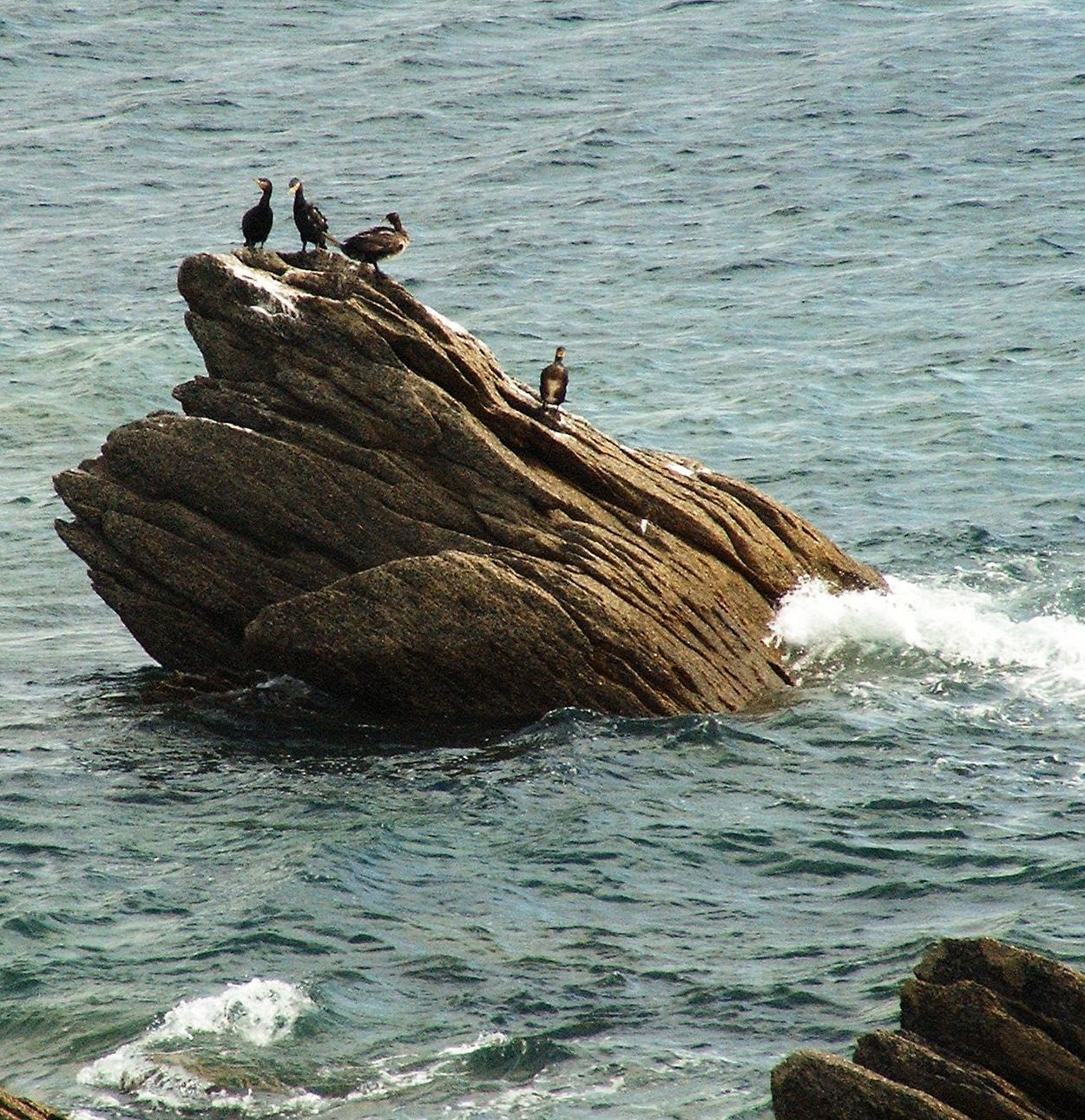 Kormorane am Hafen von Pors-Poulhan (Plouhinec).